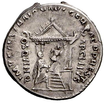 Денарий (реституционная монета Траяна), серебро Дата чеканки: 98—117 гг. Монетный двор: Рим вес: 3.47 г диаметр: 20 мм АВЕРС: MARCELLINVS — голова консула М. Клавдия Марцелла вправо; сзади — фигура из трех ног, trisceles. РЕВЕРС: IMP. CAES. TRAIAN. AVG. GER. DAC. P. P. REST. — консул Марцелл посвящает галльскую добычу в храм Юпитера Феретрия. В поле, слева и справа: MARCELLVS COS. QVINQ. Ссылки: RIC II 809; BMC RE III 689; BMC RR II 4206; Sydenham CRR 1147; Babelon Claudia 11/Cornelia 69; RSC II 35 (VF £470); Mattingly, NC 1926, 35 and PC XII, 16